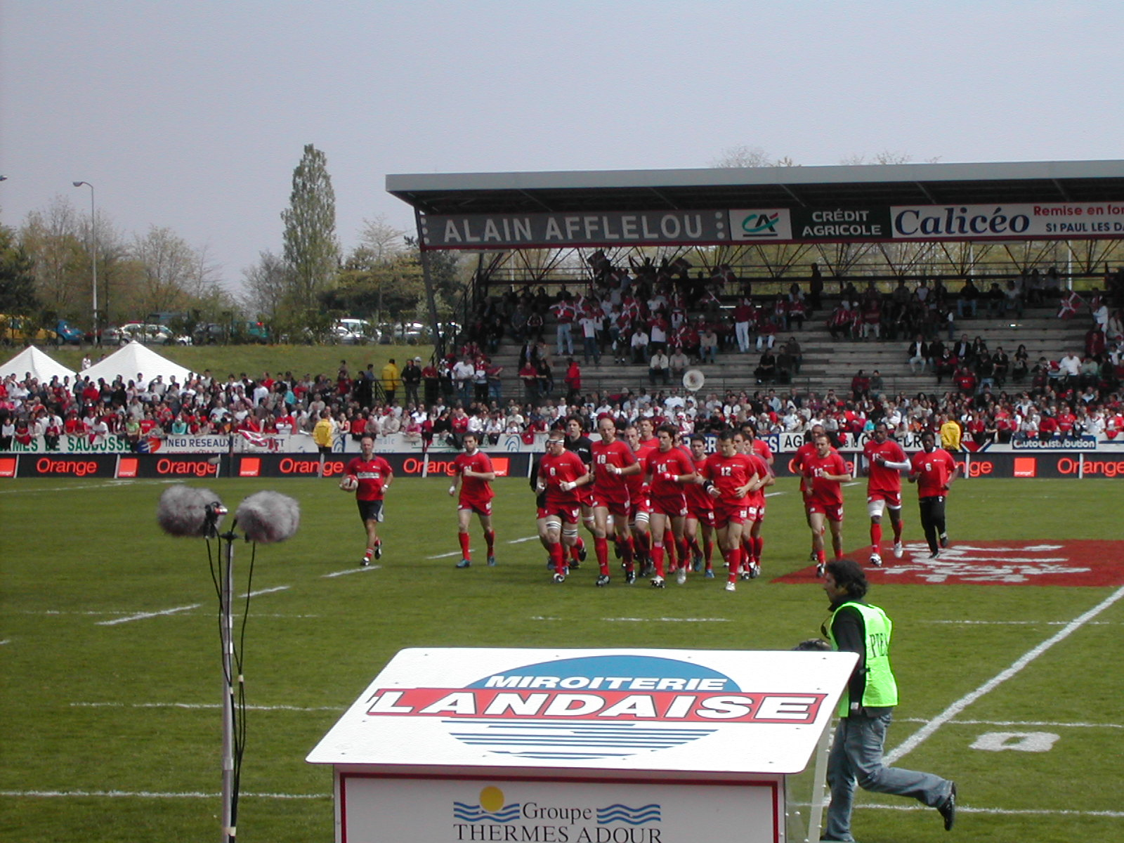 Joueurs du Biarritz Olympique à l'échauffement à Dax. 2005–06 Top 14 season — 8 April 2006, Stade Maurice Boyau. Match between: Biarritz Olympique — Stade Toulousain